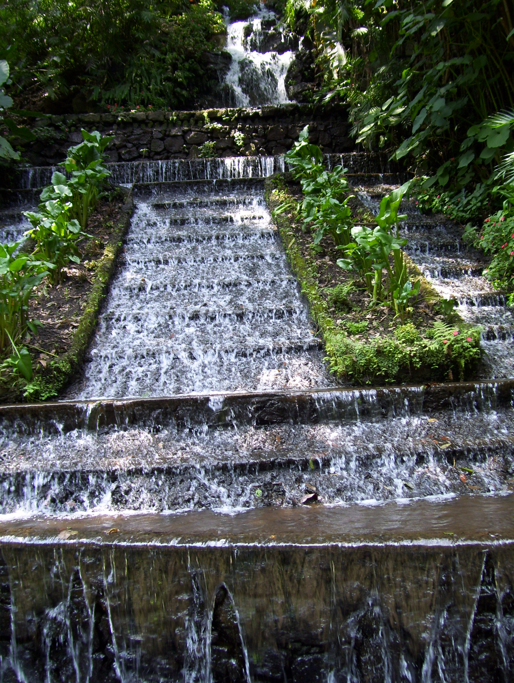 Fuente del rio — del Parque Nacional Urupan, Barranca del Cupatizio, Municipo de Uruapan, Michoacán, México.